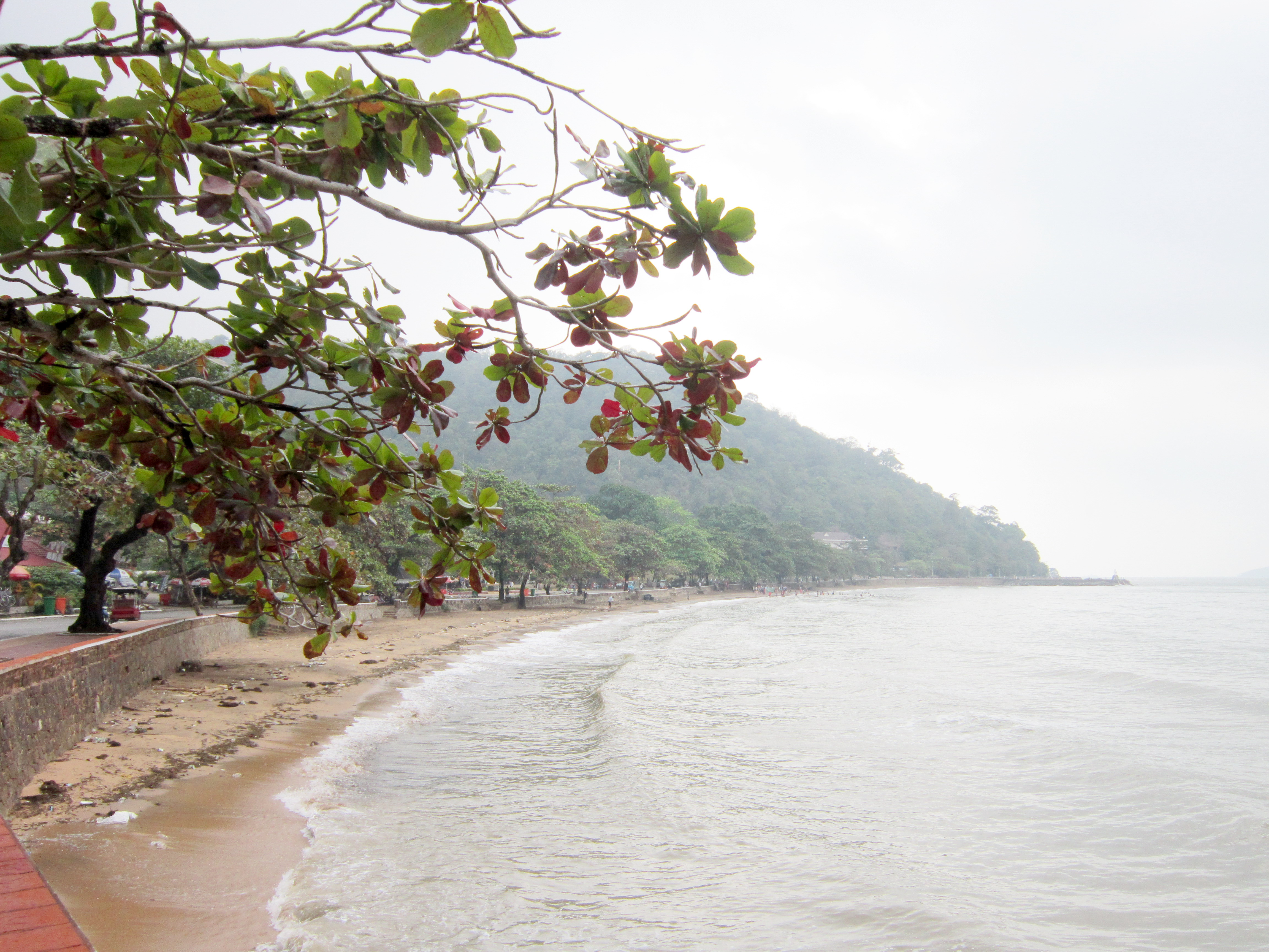 Biển Kep thuộc Campuchia dài khoảng 6 km. Một bên là biển, một bên chân núi với nhiều cây xanh.